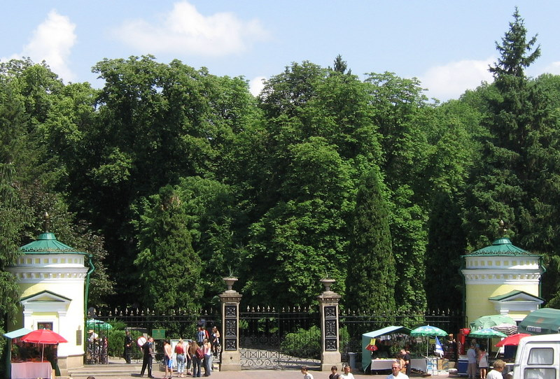 Главный вход.